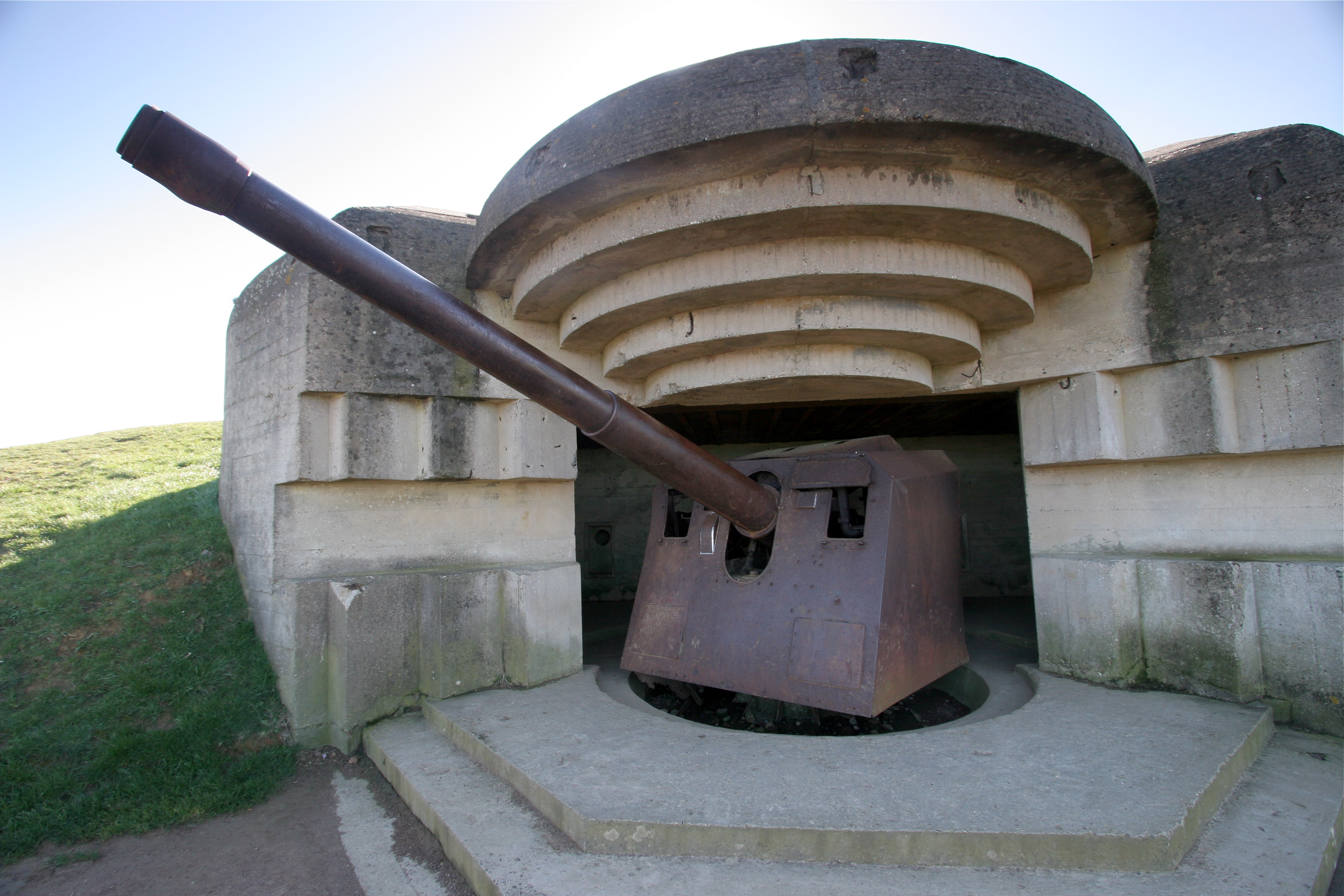 Blockhaus et canon de 15cm de la batterie de Longues sur Mer, Calvados, France